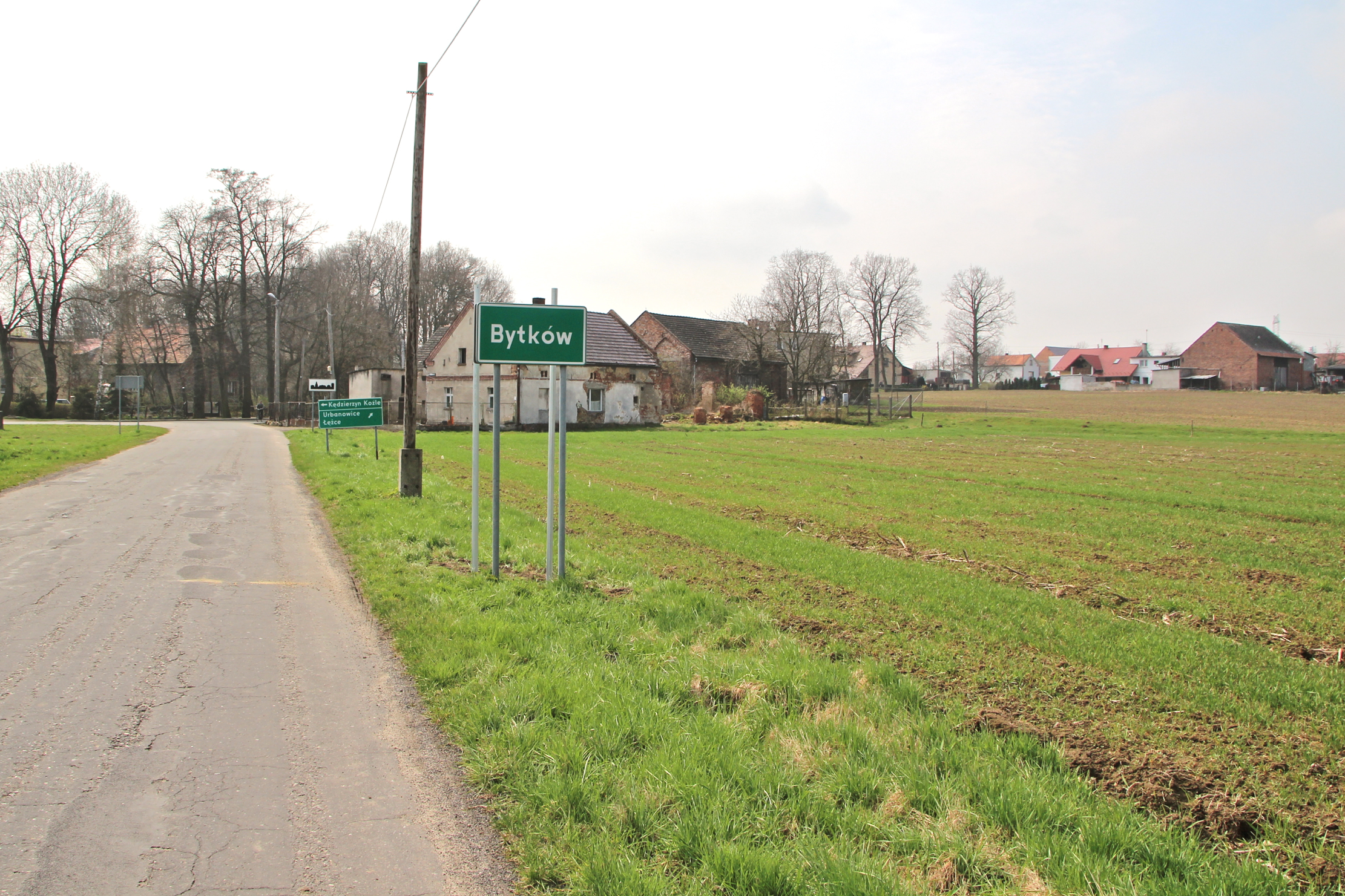 Bytków, (dodatkowa nazwa w j. niem. Pickau), – wieś w Polsce w województwie opolskim, w powiecie kędzierzyńsko-kozielskim, w gminie Reńska Wieś.